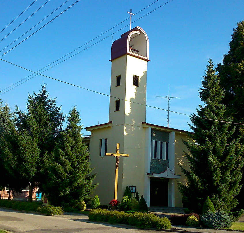 Centrum obce